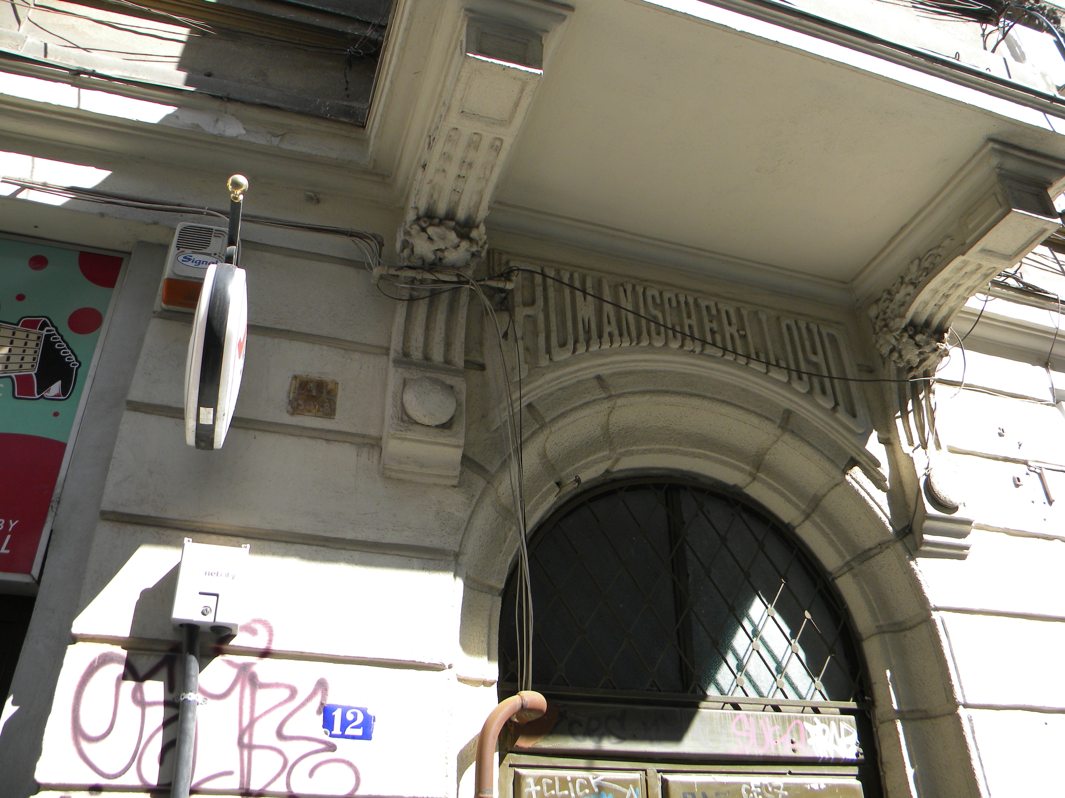 Casa pe strada Ion Brezoianu nr. 12, Bucuresti sect. 1 (detaliu)